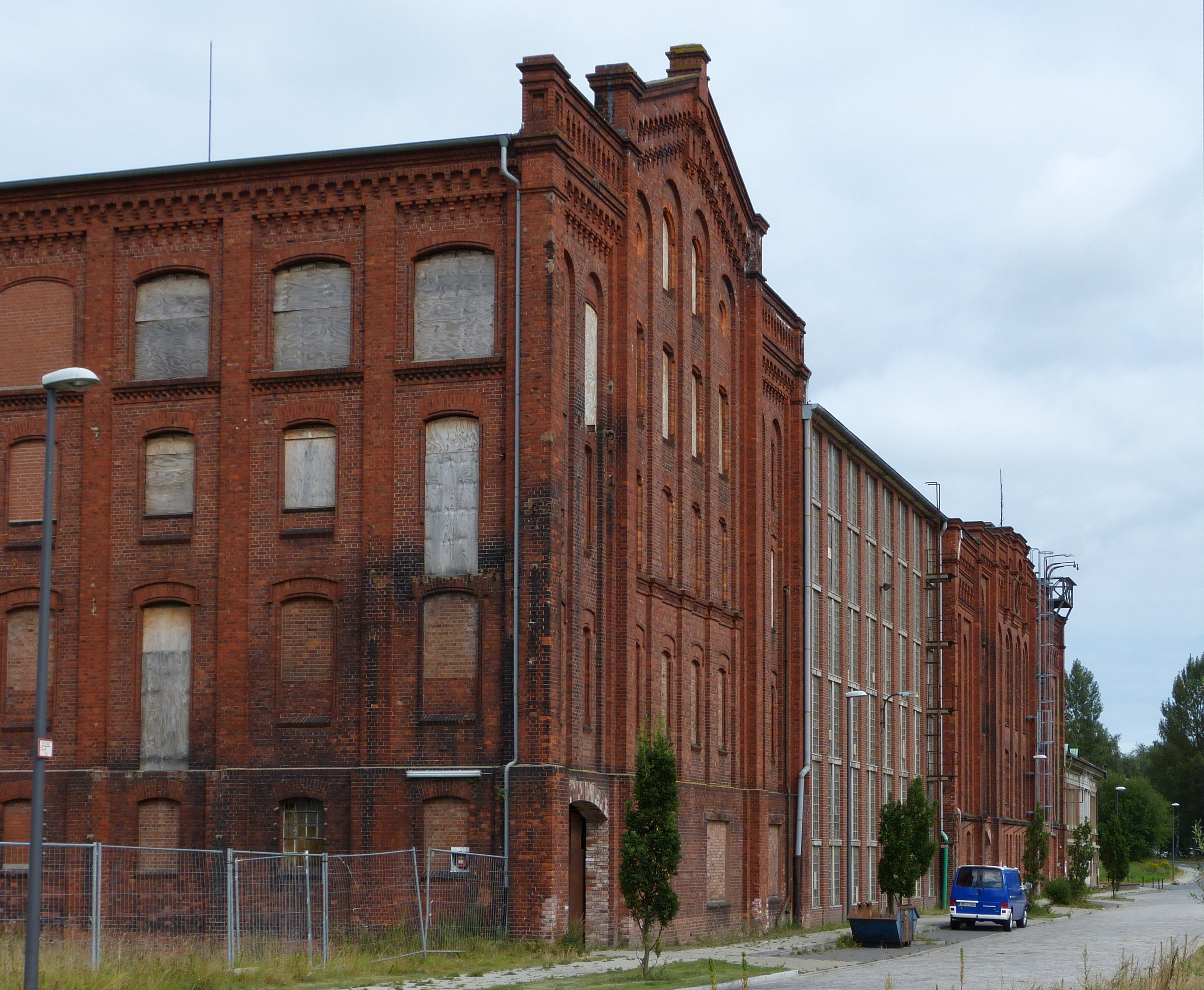 Bremer Wollkämmerei, Haus 100 und 101, Kammzuglager in Bremen, Landrat-Christians-Straße 95Das abgebildete Objekt ist ein geschütztes Kulturdenkmal in der Freien Hansestadt Bremen, mit der Nr. 2006 beim Landesamt für Denkmalpflege registriert.